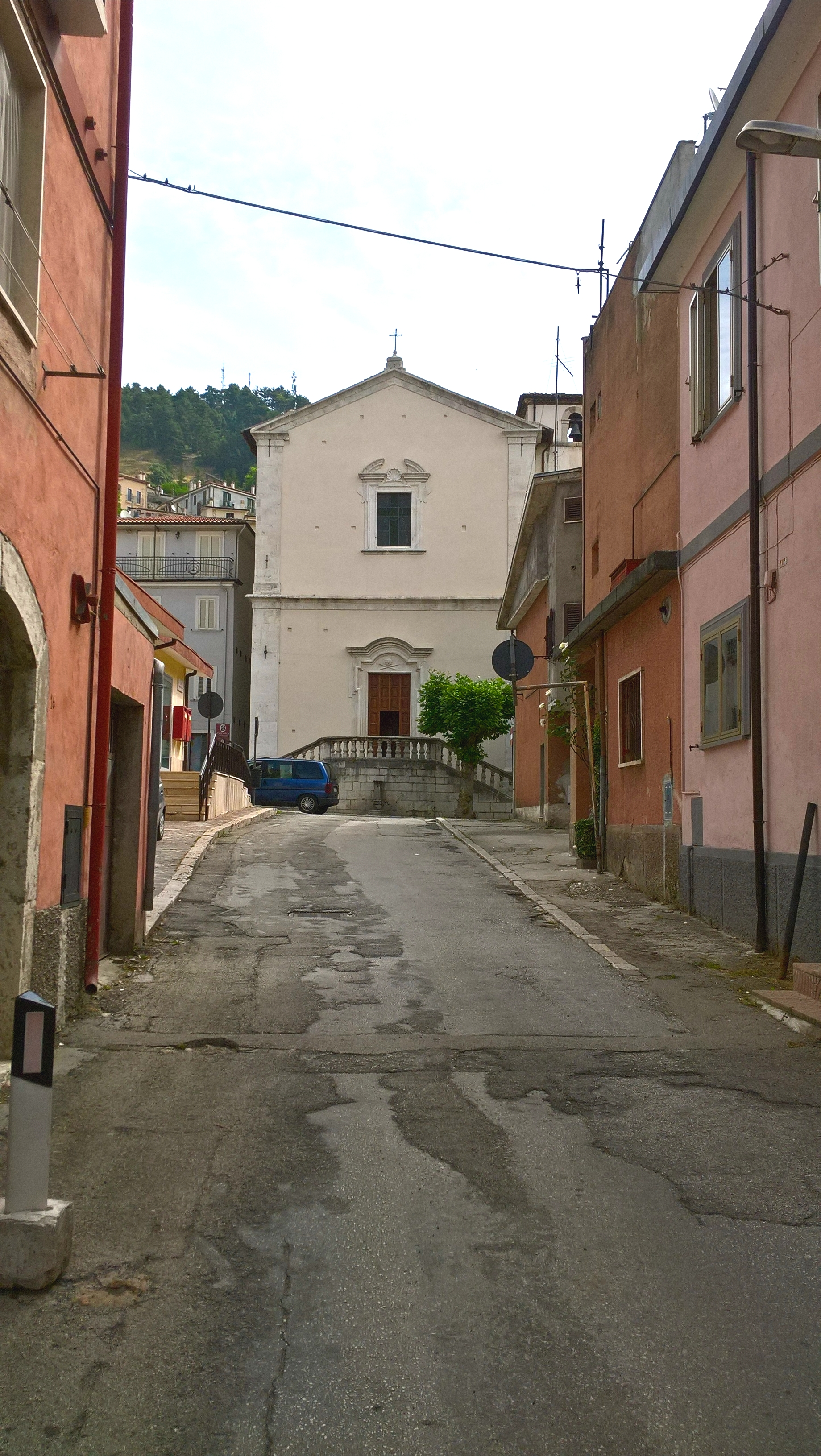 Chiesa di Orazione e Morte a Castel di Sangro, Abruzzen